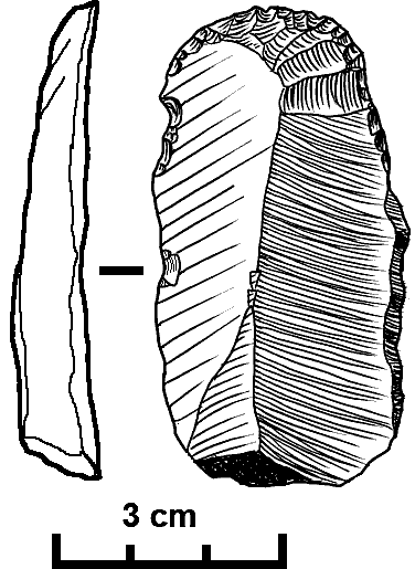 Raspador en extremo de hoja - tipo no real